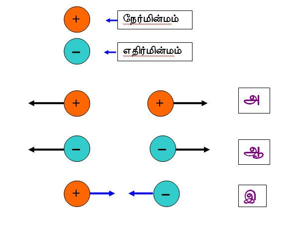 I, C.R. Selvakumar, is the author of this work and I hereby publish it under the following licenses: பகுப்பு:தமிழில் விளக்க வரைபடங்கள்